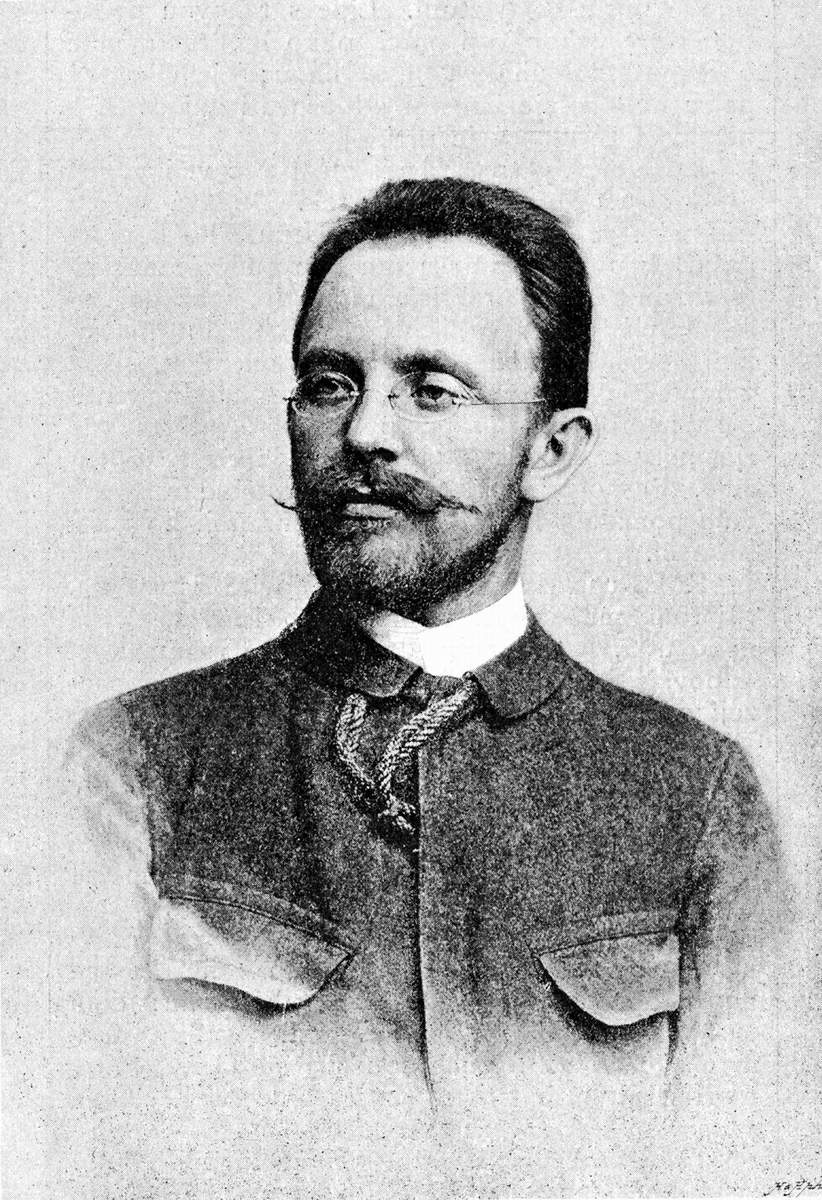 Česky: Ludvík Kuba (1863—1956).